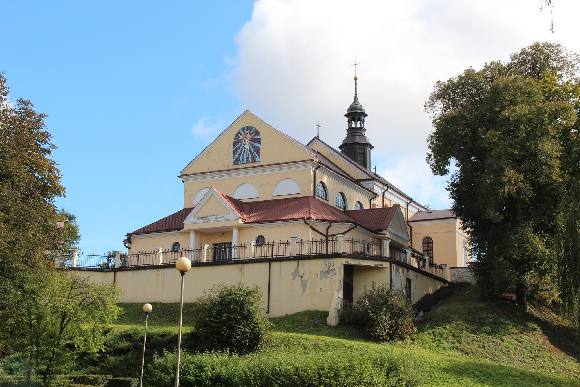 Bychawa - zespół kościoła par. p.w. św. Jana Chrzciciela